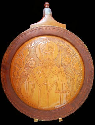 Пљоска са приказом Светог Николњ